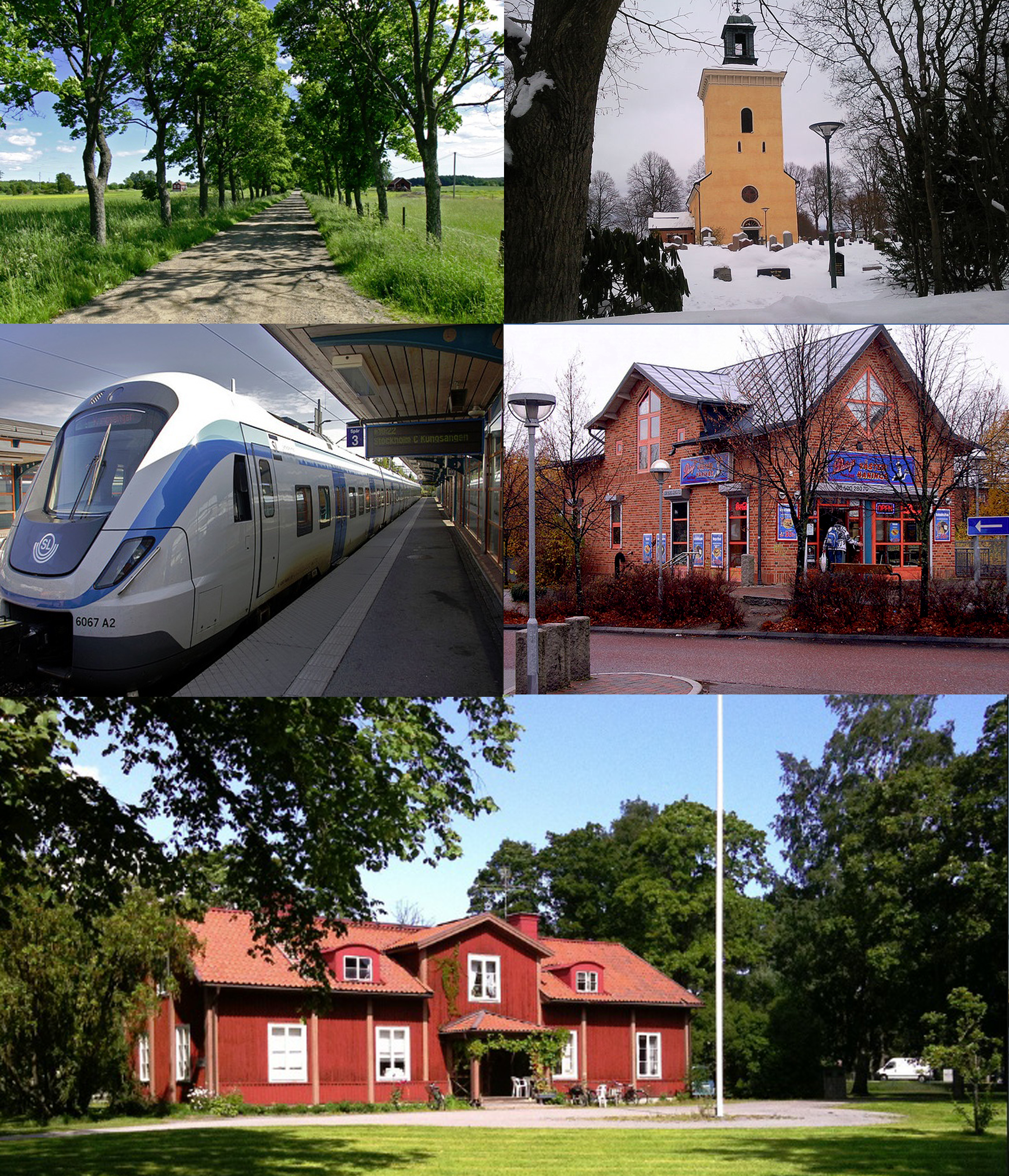 västerhaninge omgivning